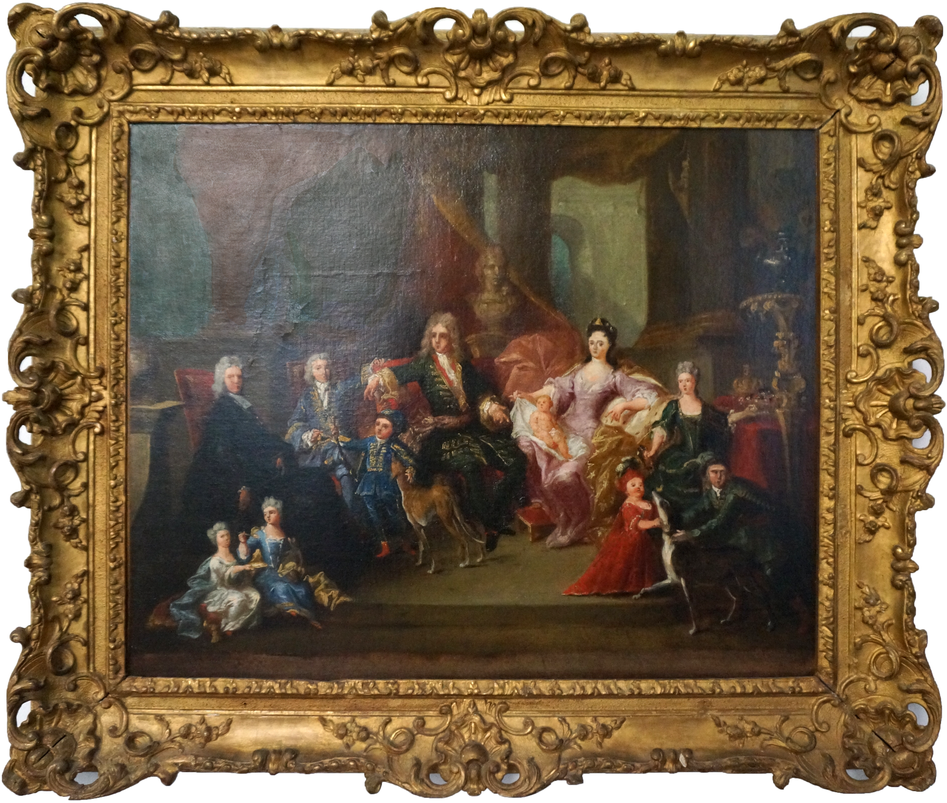 Peinture présenteé au Musée Lorrain.